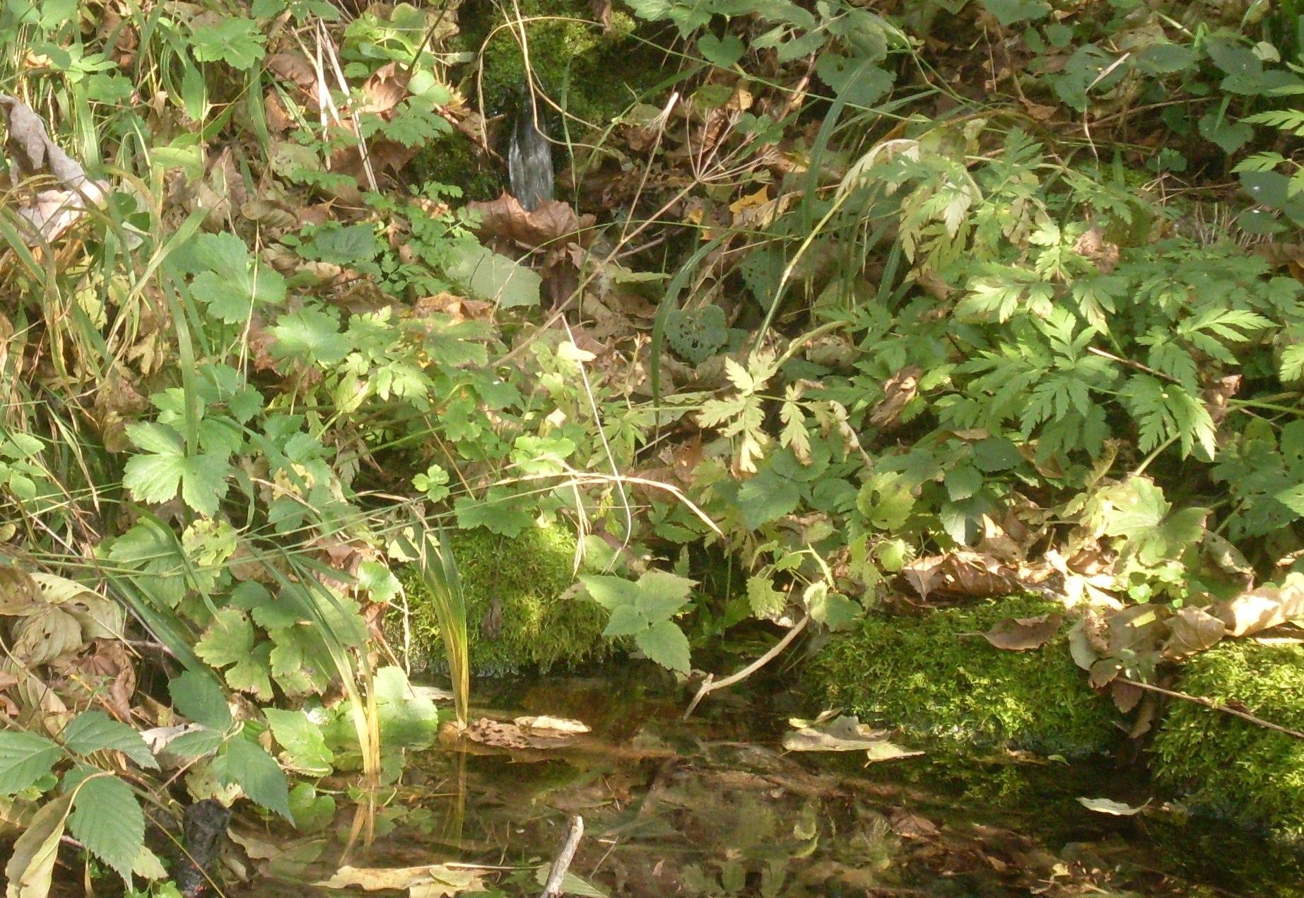 Źródło Nowe.Krzeszowice-Czatkowice.Boczny wypływ.